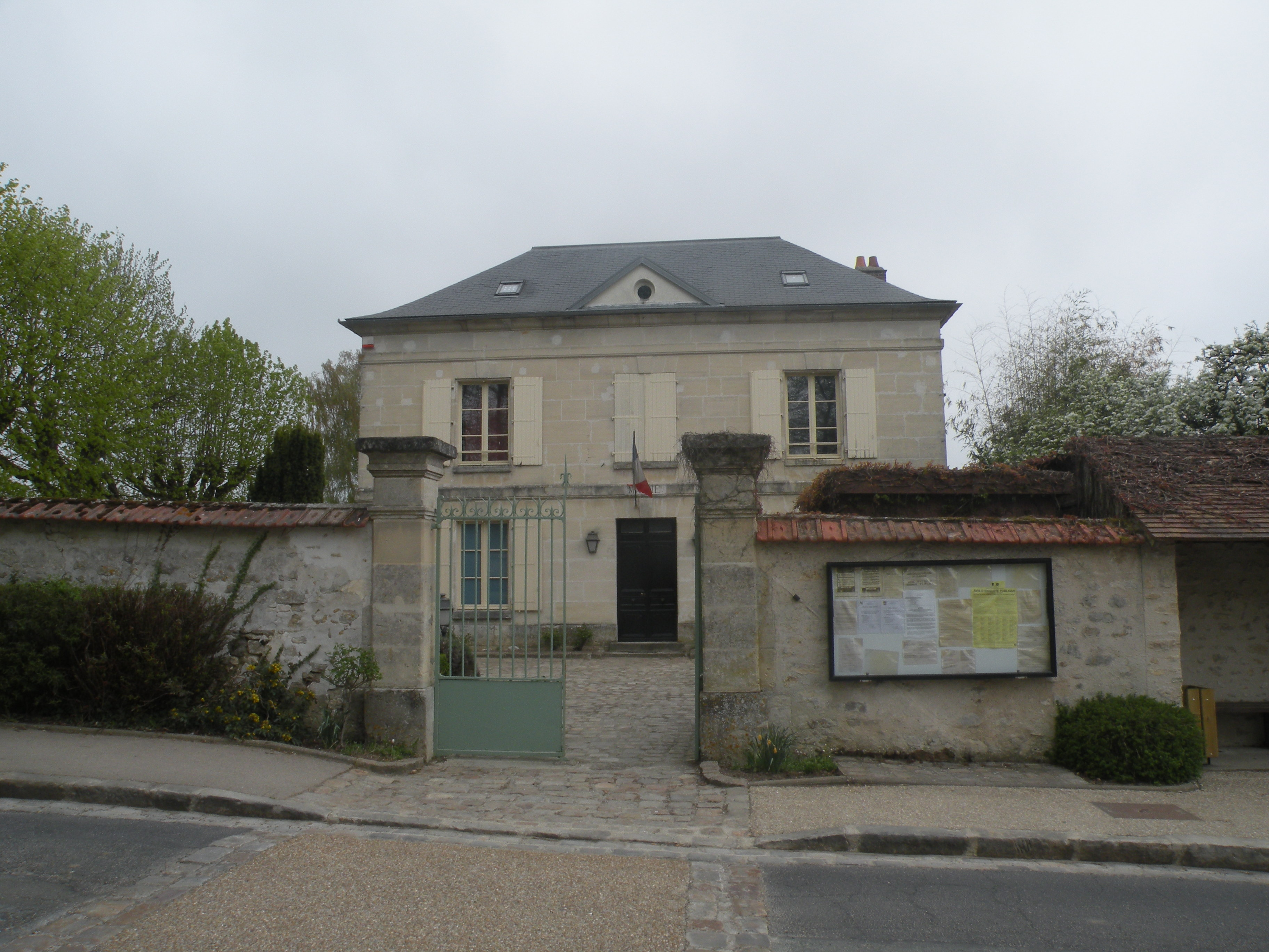 Maudétour-en-Vexin mairie